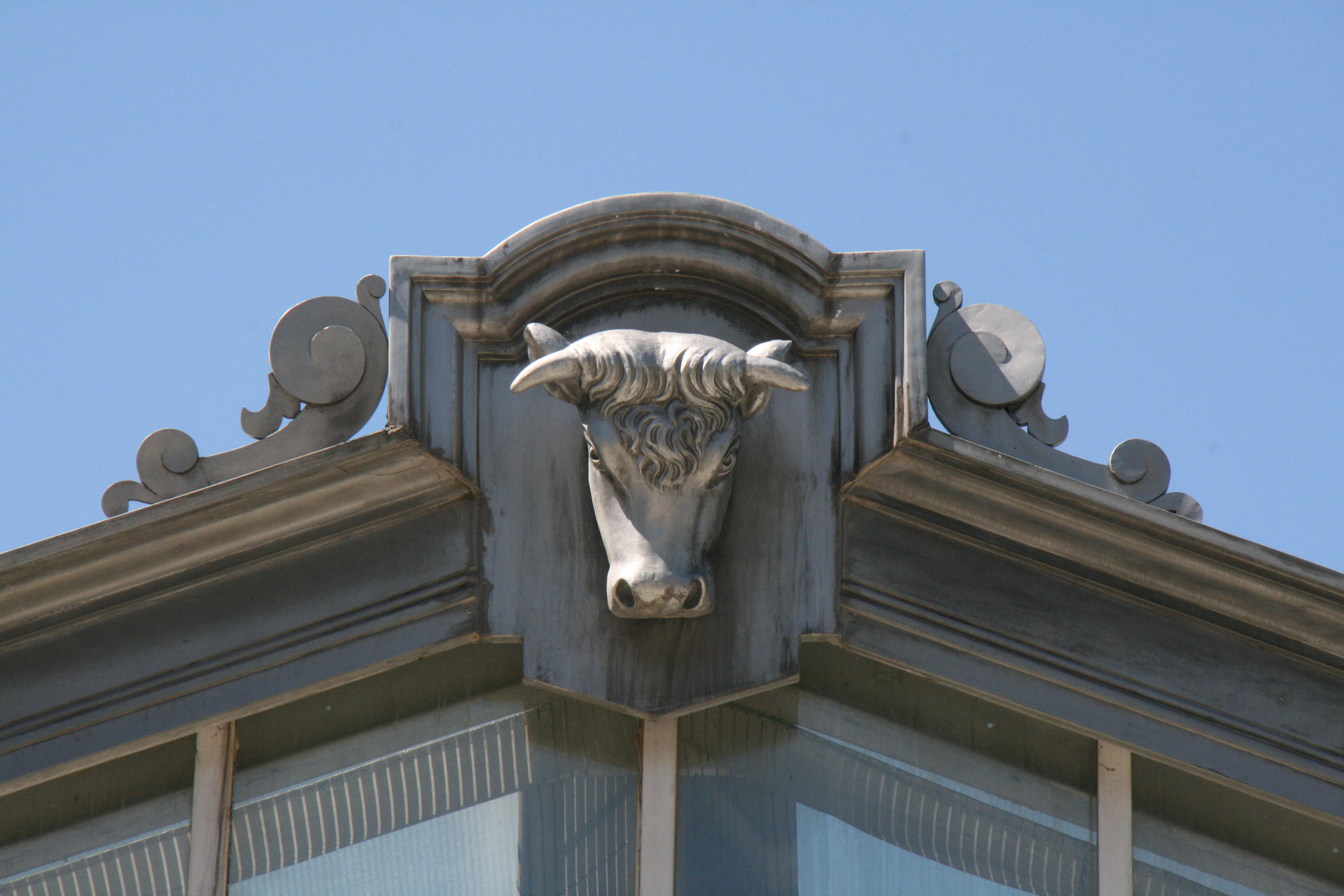 Cabezas de Vaca en el Matadero. - Arganzuela